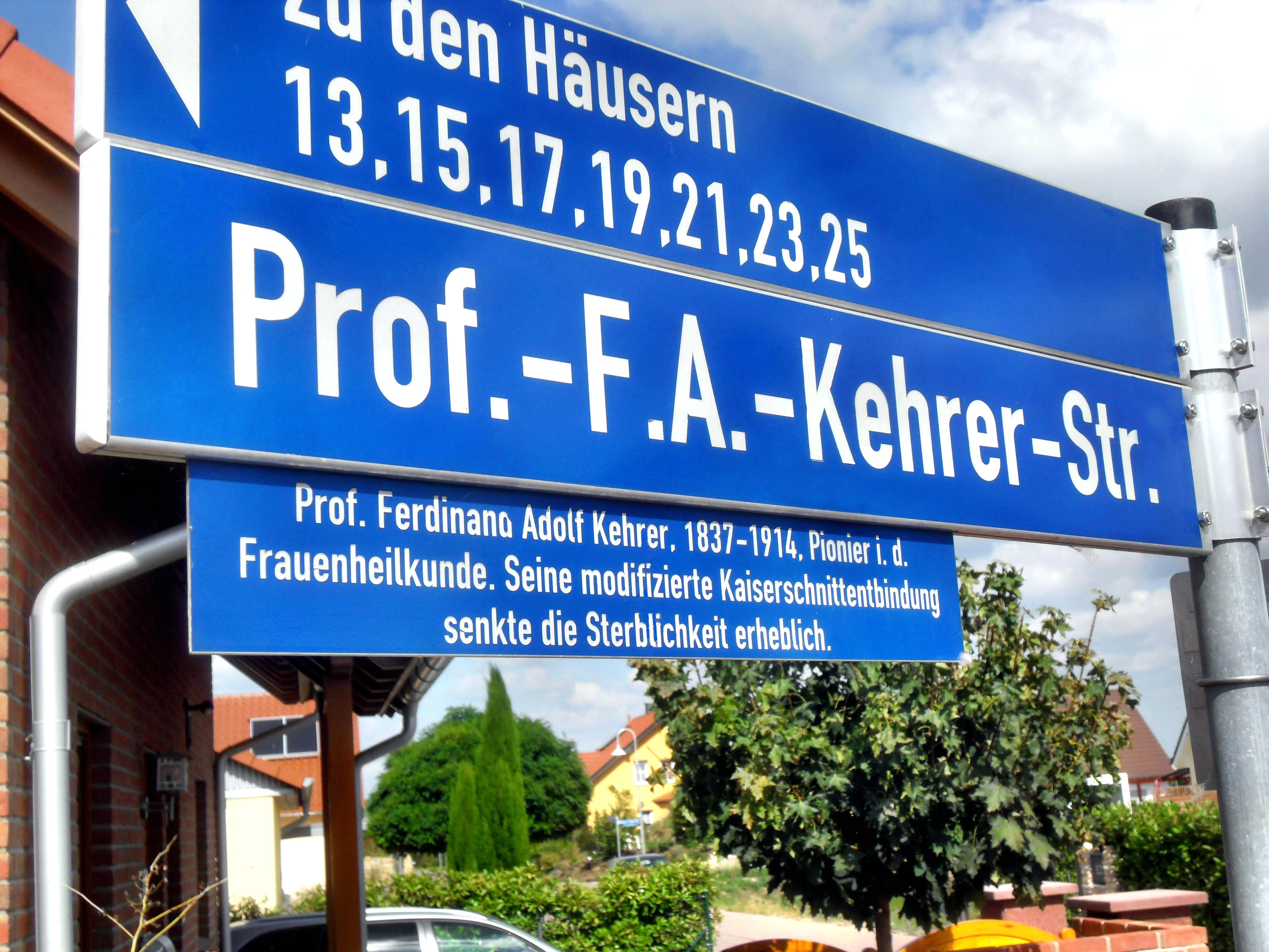 Straßenschild der Prof.-F.A.-Kehrer-Straße im rheinhessischen Guntersblum (Deutschland)